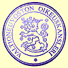 Oikeuskanslerin leima